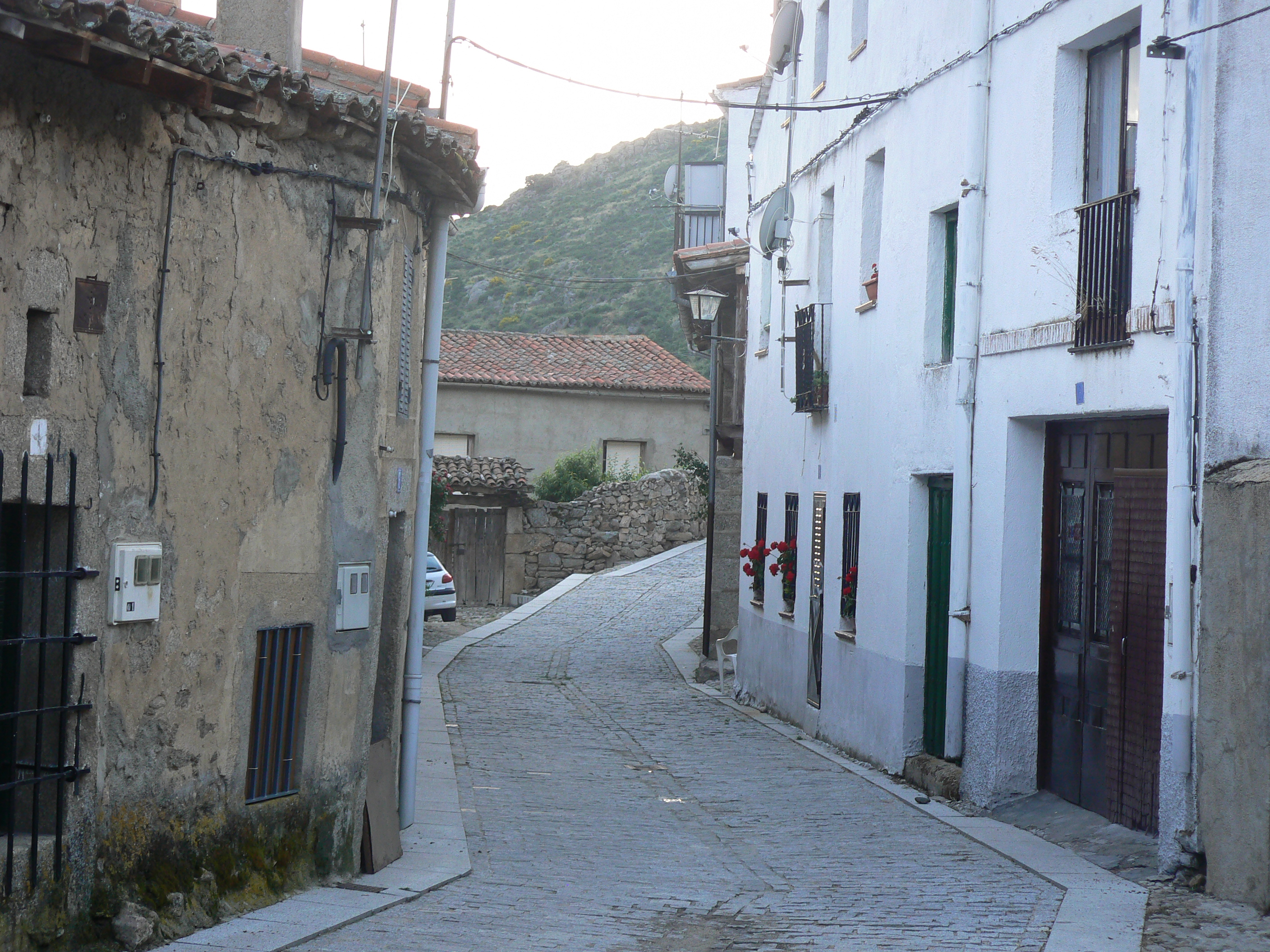 Callejuela (Navacepedilla de Corneja; Ávila; España)